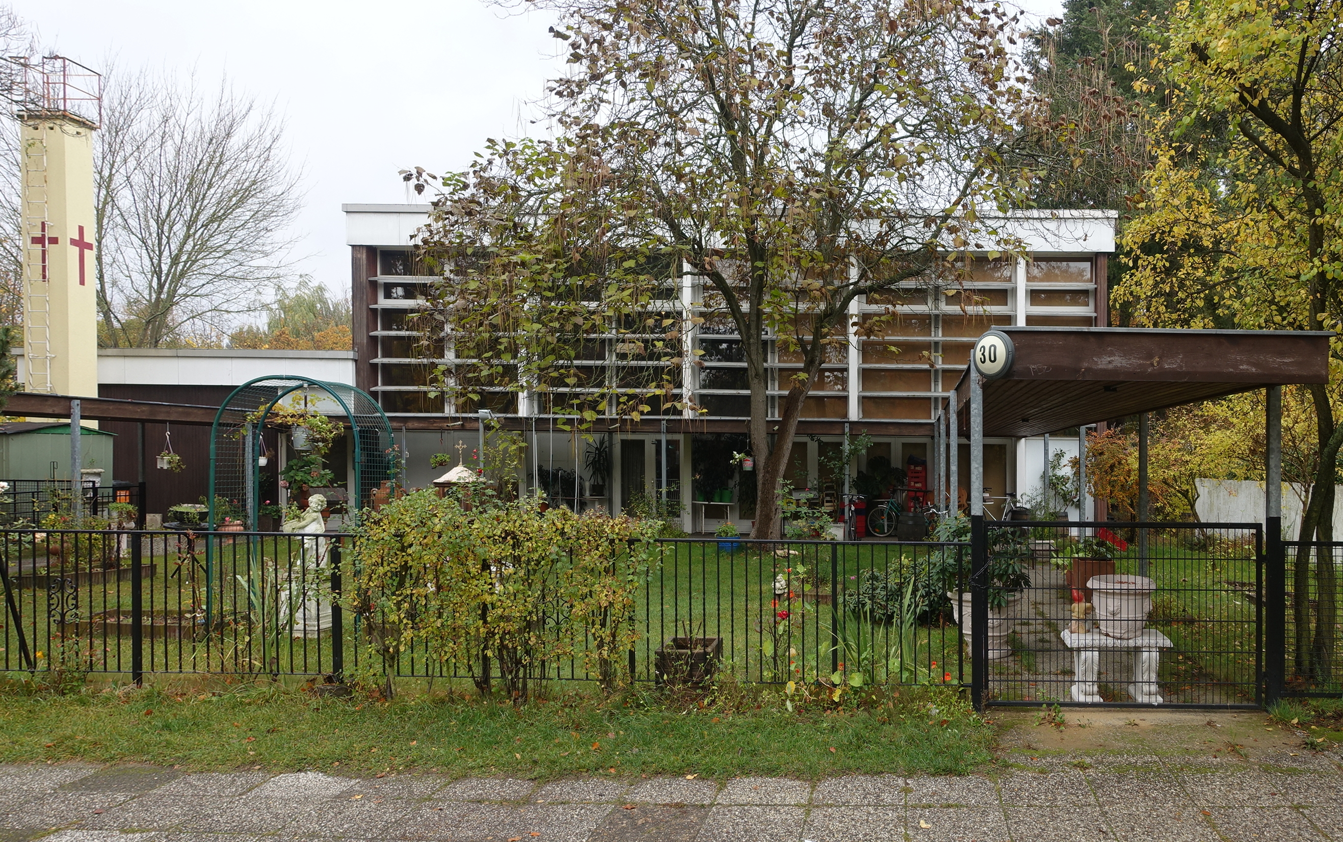 Blick von der Straße auf das Gemeindezentrum am Buschgraben